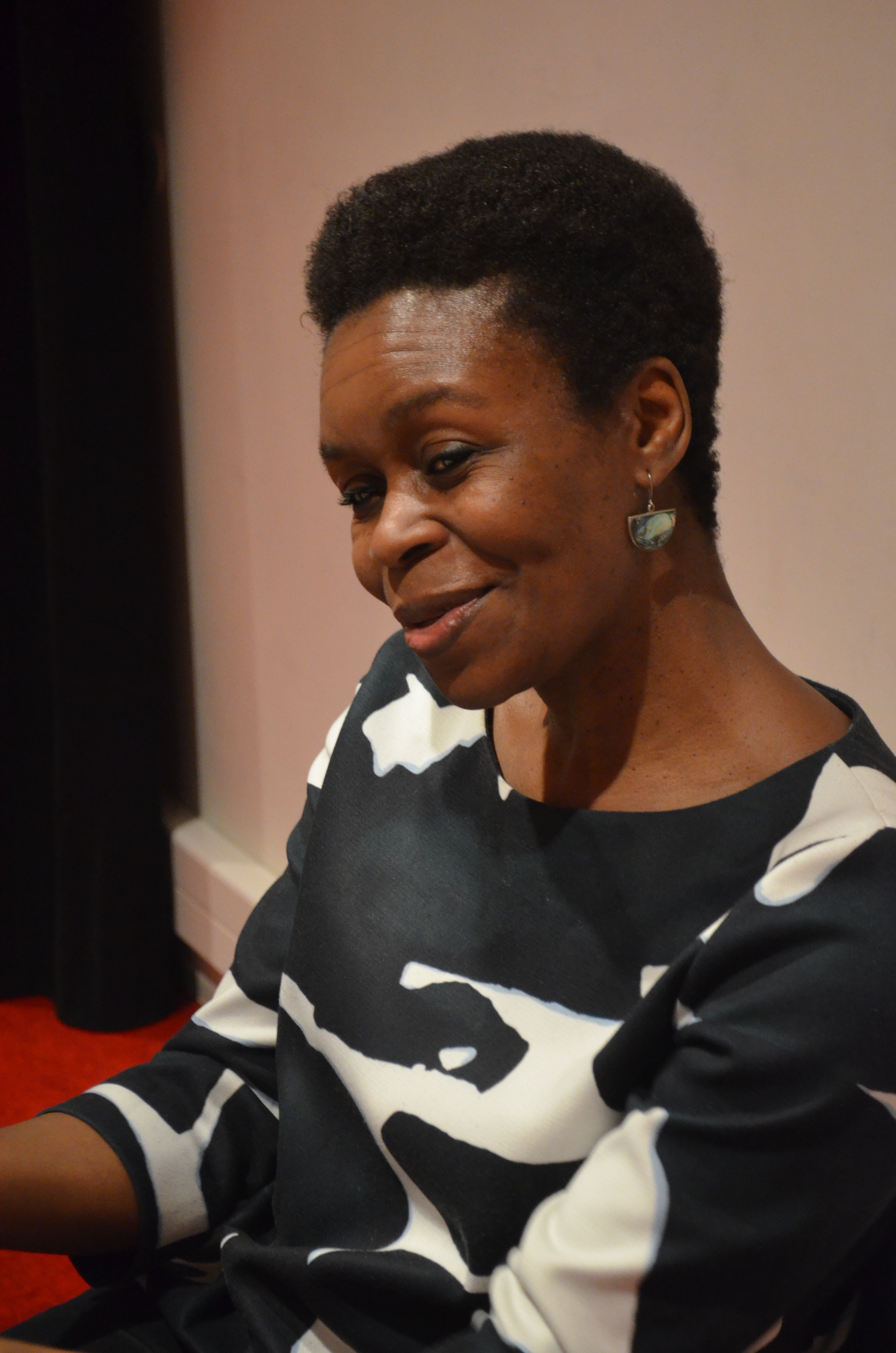 Kidi Bebey lors d'une rencontre à la médiathèque du pôle culturel d'Alfortville le 28 janvier 2017.